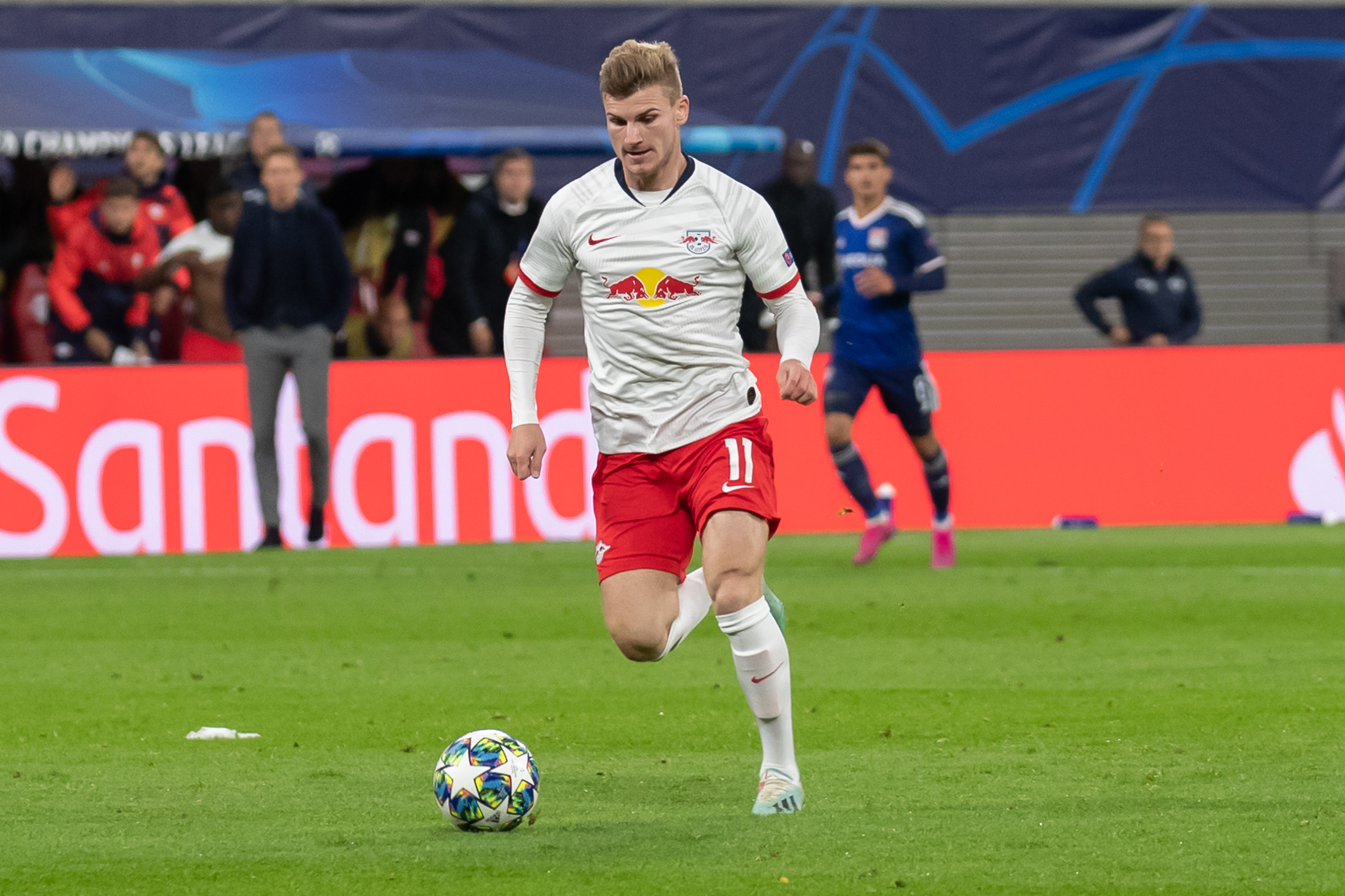 Fußball, Männer, UEFA Champions League, RB Leipzig - Olympique Lyonnais; Timo Werner (RB Leipzig, 11); Freisteller, Einzelbild, Aktion, action